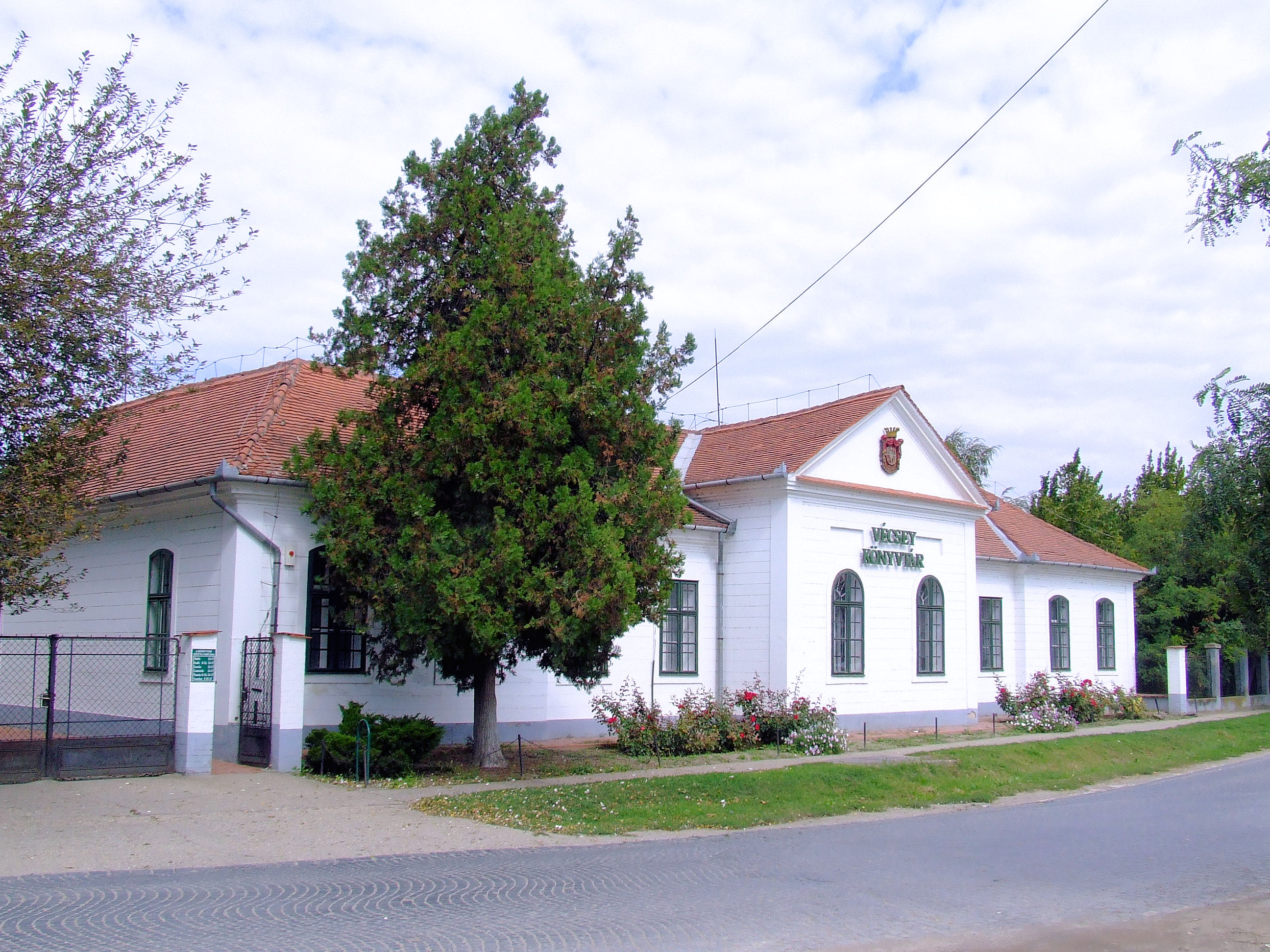 A solti Vécsey-kastély. Ma Vécsey Könyvtár This is a photo of a monument in Hungary, Identifier: 2340